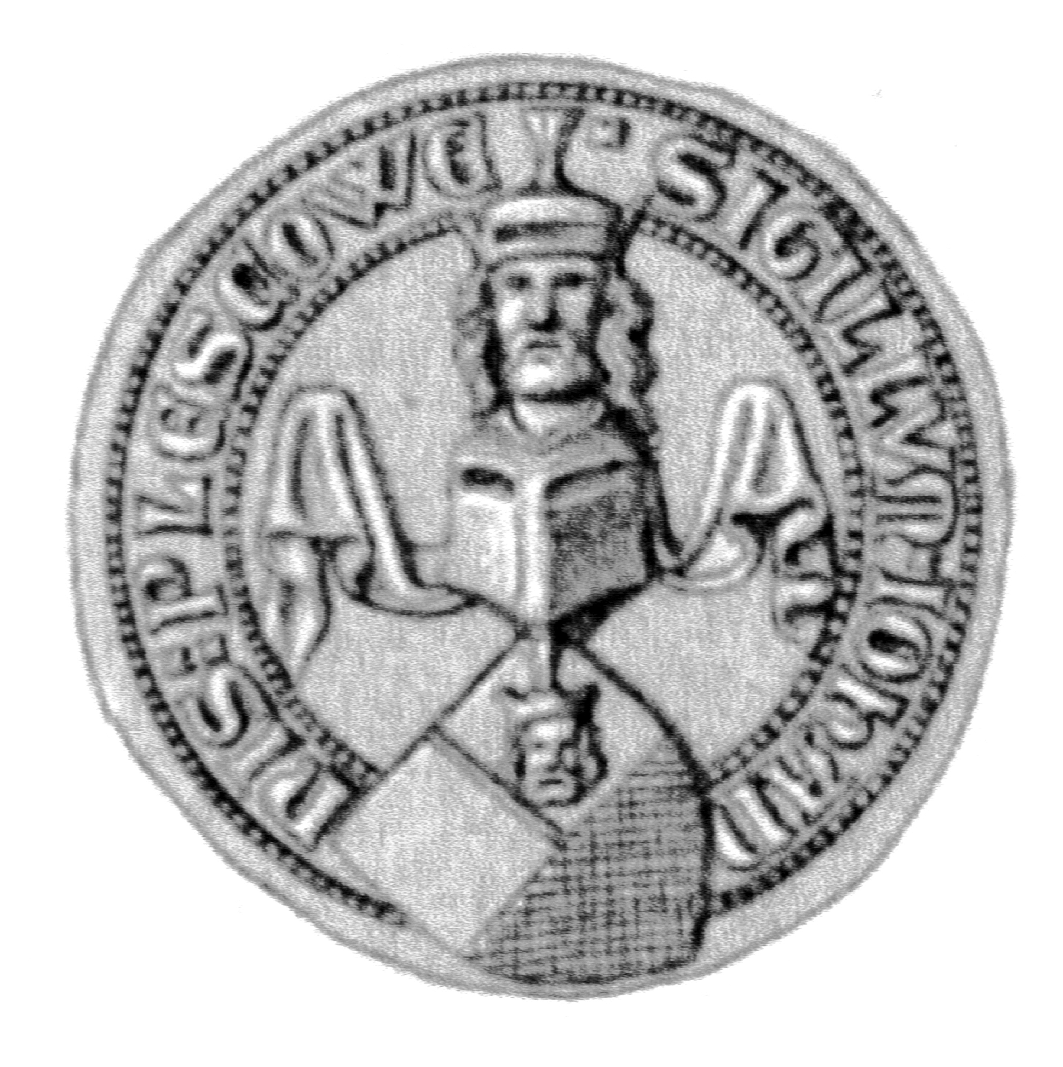 Siegel des (Ratsherren)Johannes Pleskow (* (vor) 1308 in Lübeck; † 1367 ebenda), Kaufmann und seit 1348 Ratsherr in Lübeck. Das Siegel stammt aus der Zeit um 1347 (Siehe Ratsherr Nr. 361)